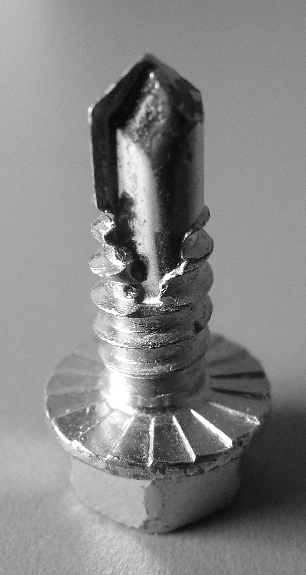 Bildinhalt: Auf dem Kopf stehende Bohrschraube Aufnahmeort: Baden-Baden, Deutschland